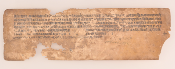 Dernier feuillet d'un manuscrit du Yavanajātaka, conservé dans les archives du NGMPP